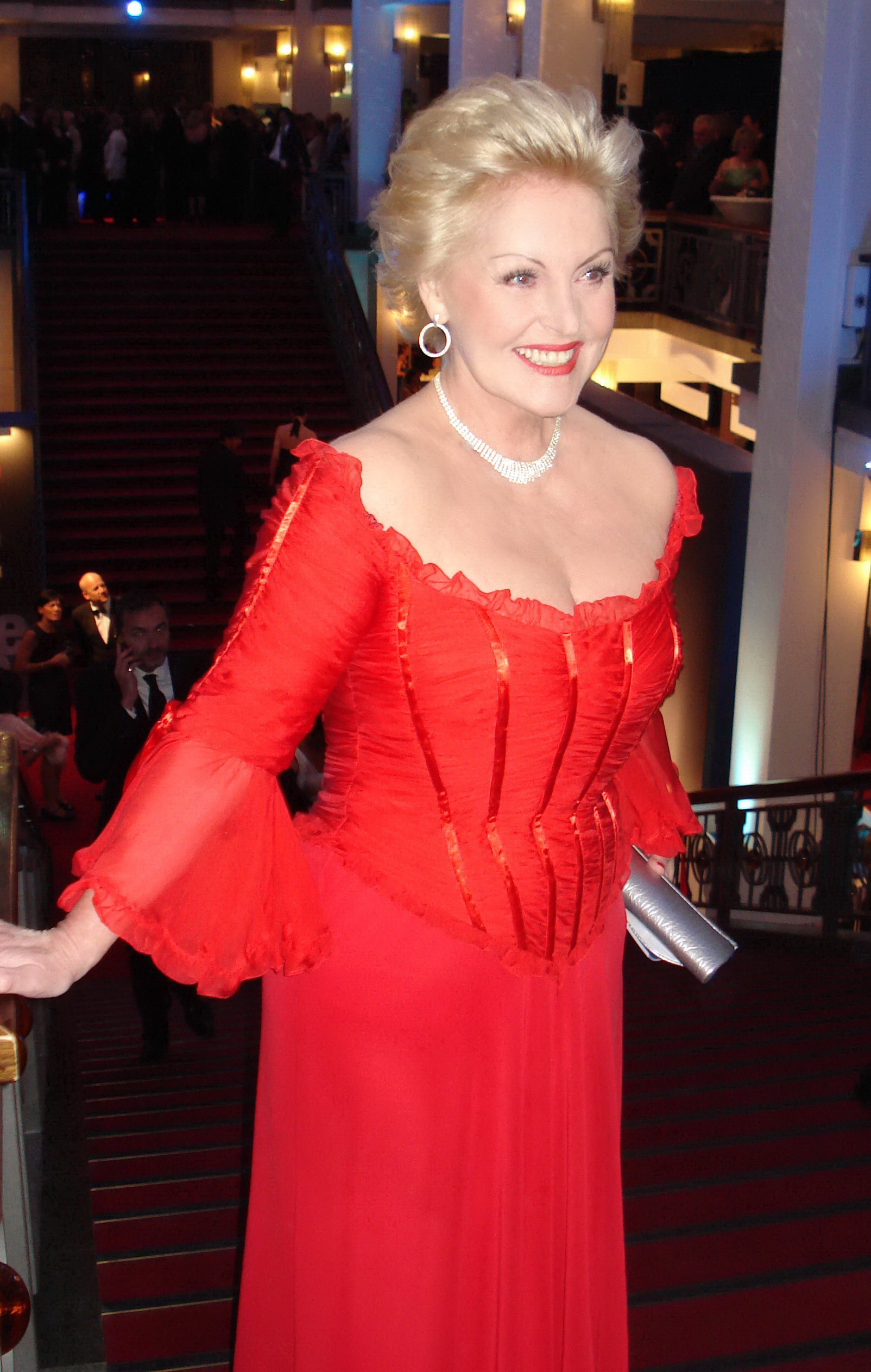 Entertainerin Petra Kusch-Lück bei der Verleihung der Goldenen Henne 2009 im Friedrichstadtpalast Berlin.